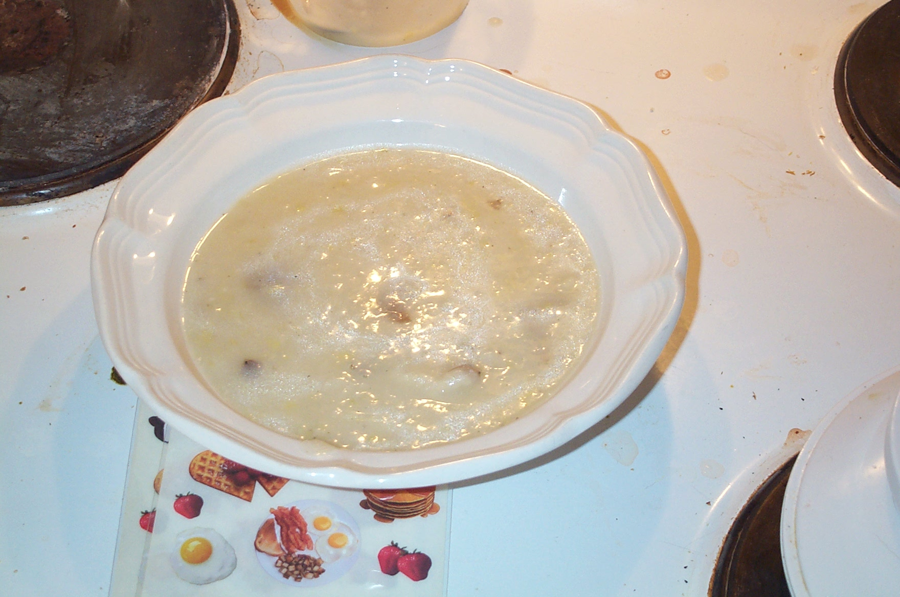 Potage de pomme de terre à la truffe